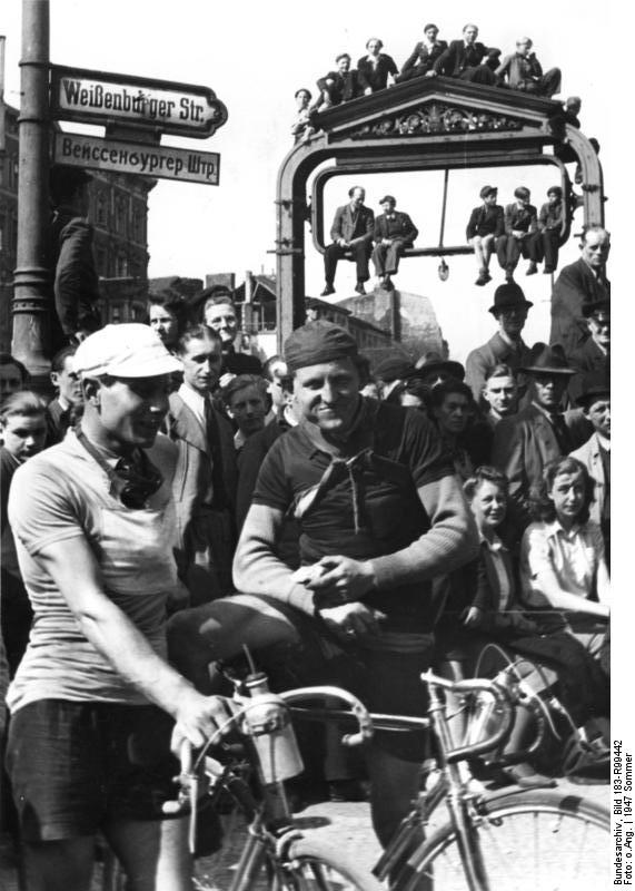 Berlin, Rennfahrer beim Radrennen Berlin-Cottbus-Berlin ADN-Zentralbild Ein kleiner Schnappschuss vom Radrennen Berlin-Cottbus-Berlin [am U-Bahnhof Weißenburger Straße]. 534-47 Information added by Wikimedia users. Ergänzung: Die Weißenburger Straße in Berlin-Prenzlauer Berg heißt seit 1947 Kollwitzstraße.